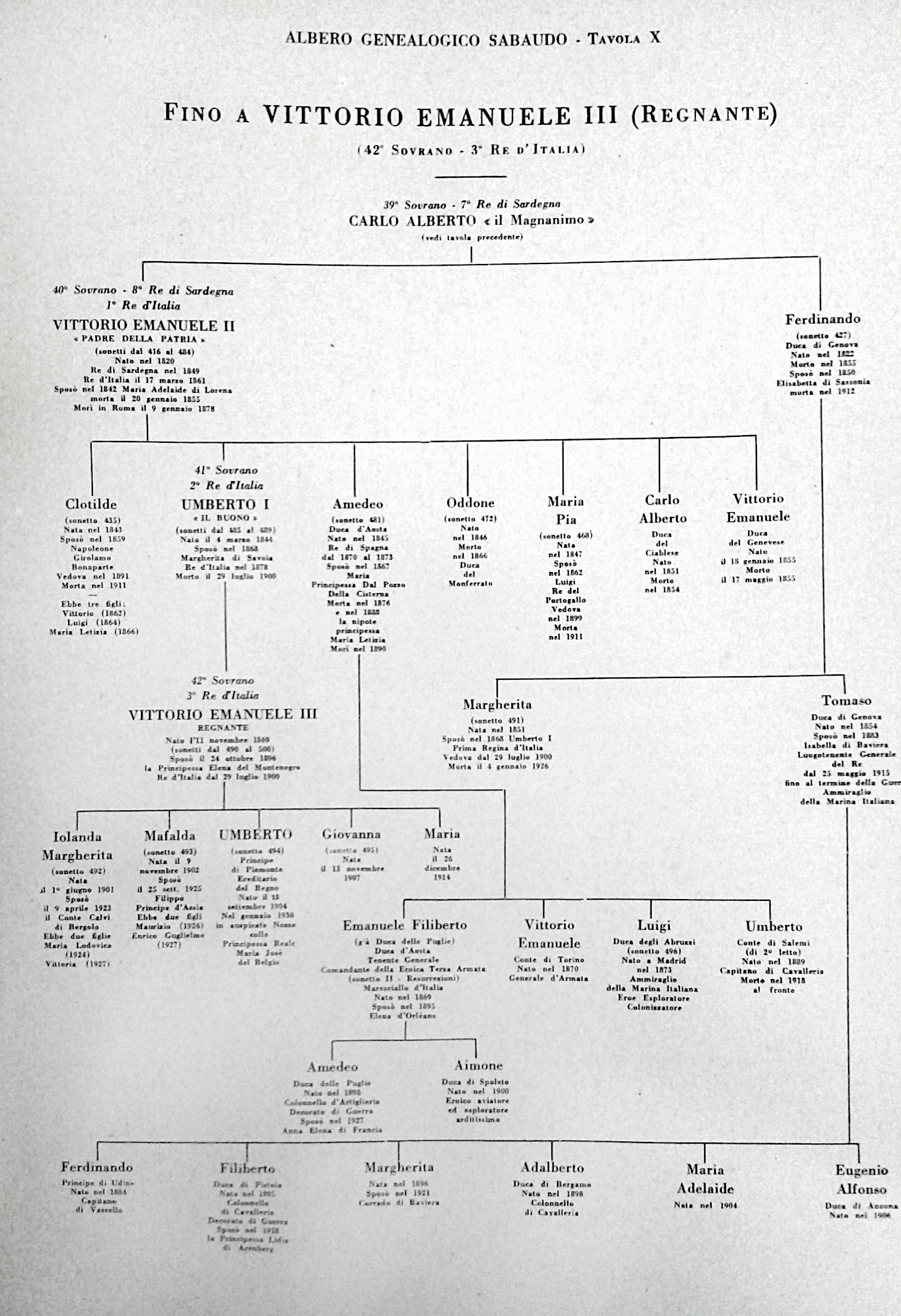 Albero genalogico di Casa Savoia